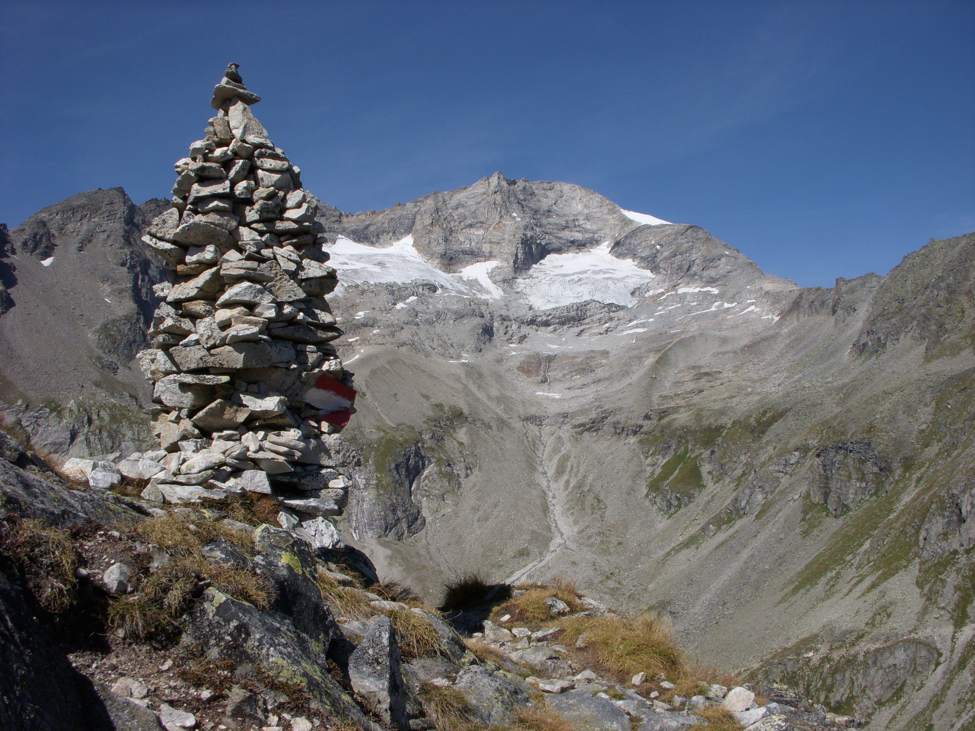 Steinmännchen in den Zillertaler Alpen. Blick über das Unterschrammachkar nach Norden zum Olperer.